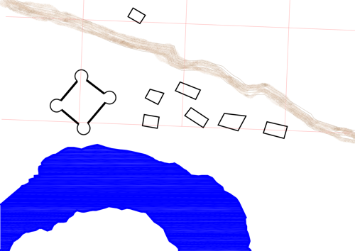 Croquis de Caer Antur, en Rawson Chubut, (fuerte viejo), 1854